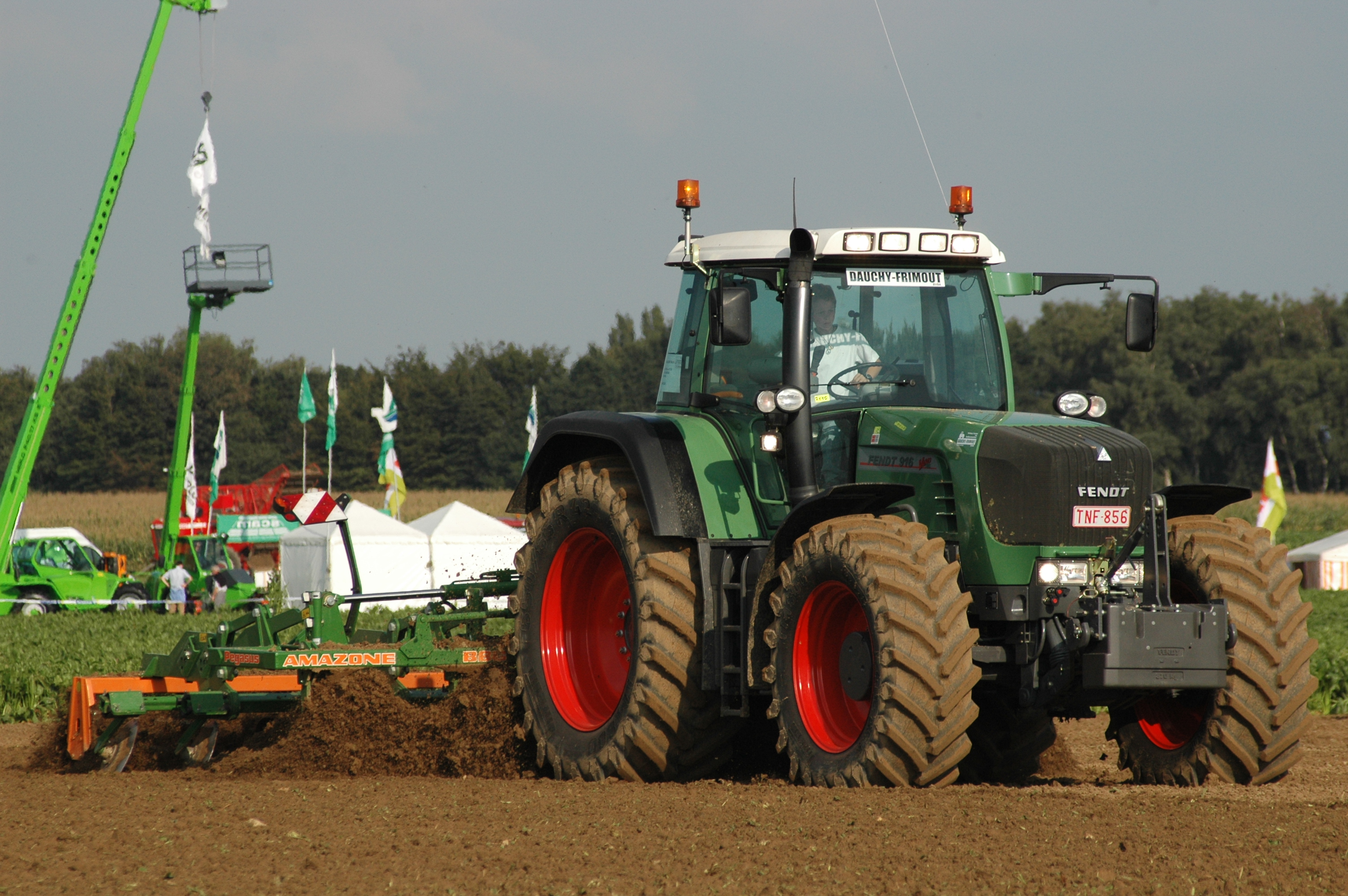 Fendt-Traktor 916 Vario TMS mit Anbau-Scheibengrubber Pegasus von Amazone (BBG), im Hintergrund zwei Merlo-Teleskoplader; Werktuigendagen 2005, Belgien